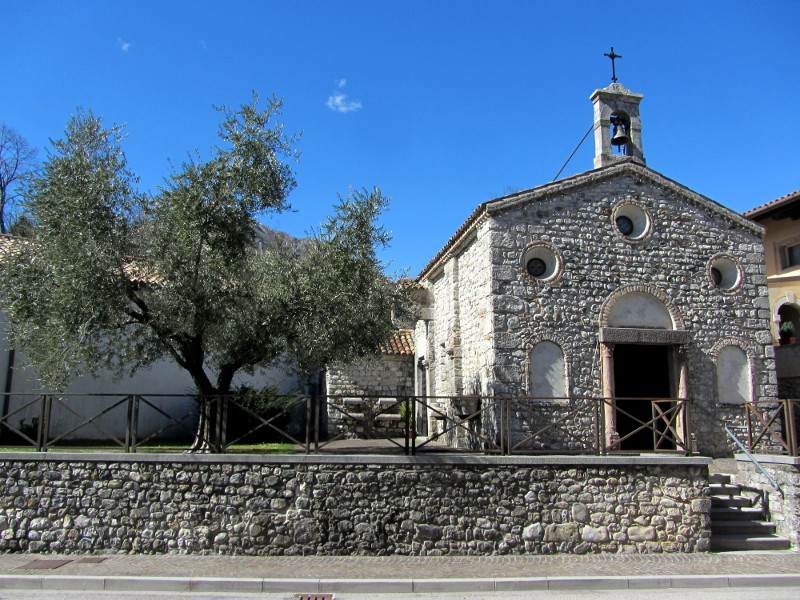 Chiesa di Ognissanti - Ospedaletto (UD) - ITALY